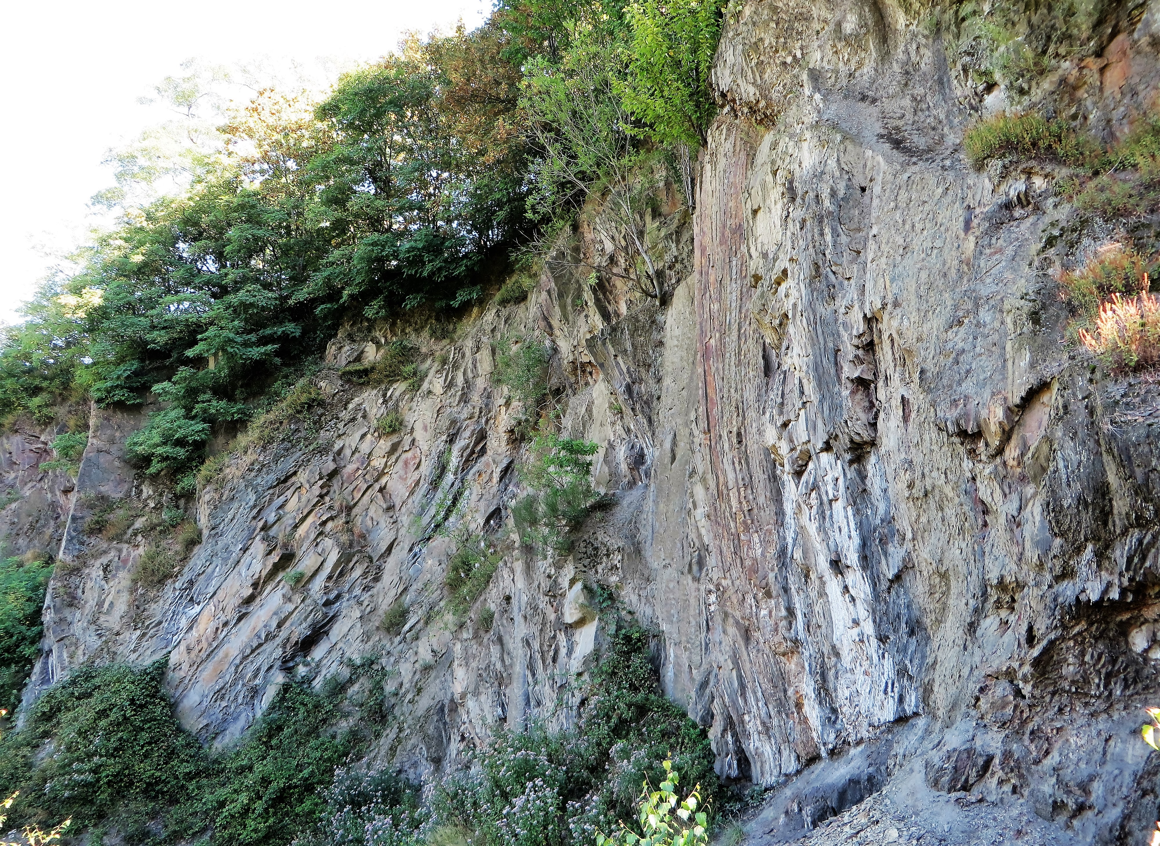 Naturdenkmal 1.3.2.2.4 „Geologischer Aufschluss Steinbruch Vorhalle“ in Hagen, Sporbecker Weg (Foto: „Kersberg-Wand“). Der ehemalige Ziegelei-Steinbruch ist eine der wichtigsten Fossilfundstellen in Deutschland. Die hier aufgeschlossenen Sedimente aus Schieferton mit eingelagertem Grauwackesandstein des unteren Oberkarbon (Namur B) wurden vor etwa 319 Millionen Jahren im Bereich einer Lagune und eines Großen Flußdeltas abgelagert. Die anzutreffenden Faltenbilder und Gebirgsstörungen sind als Vorhaller Schichten bekannt. 2006 als „Nationaler Geotop“ ausgezeichnet.